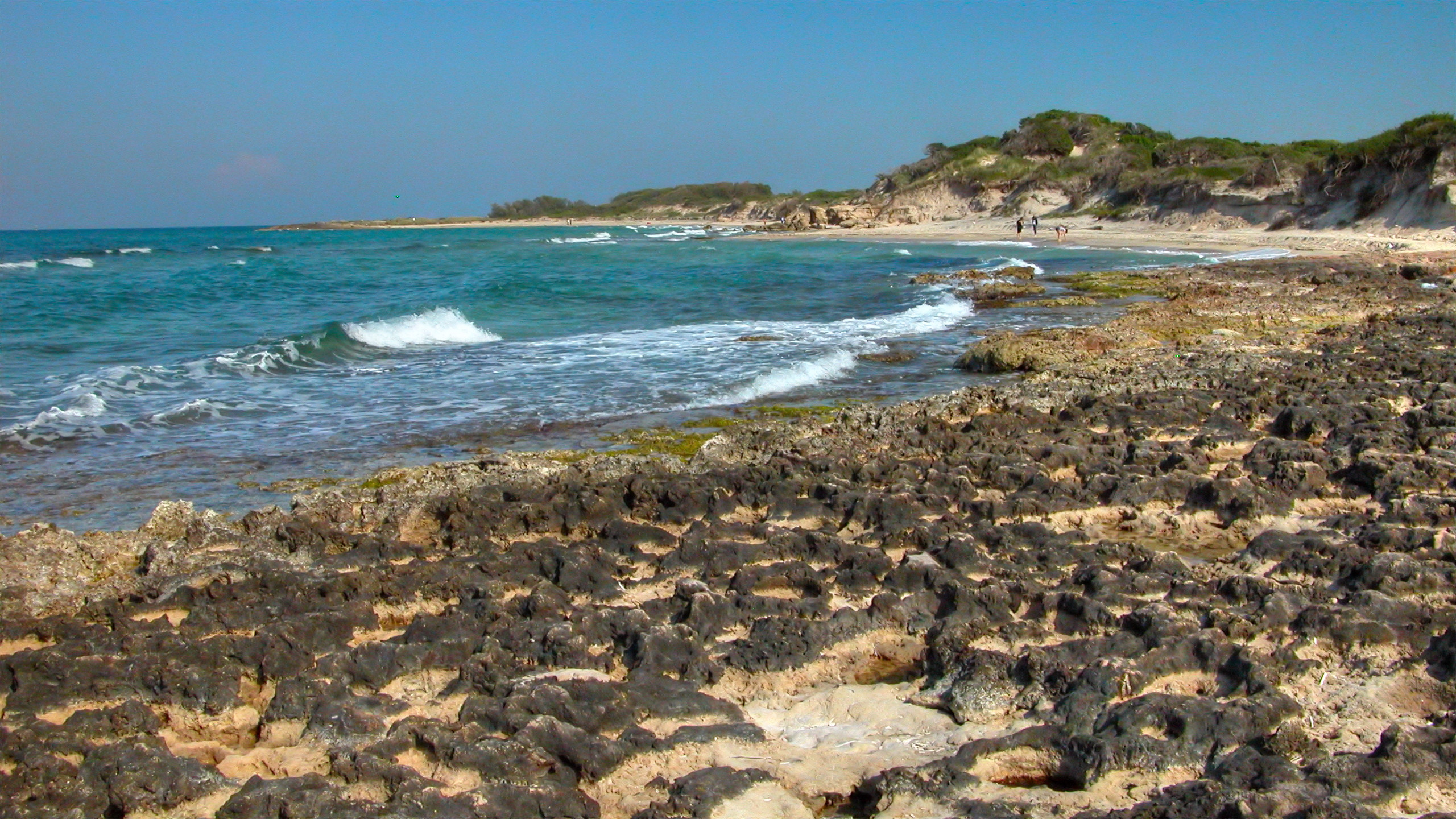 Autore e data: Stefano Trezzi (yoruno sparisci sott'acqua 13:43, 6 mag 2007 (CEST)) Fonte: scatto da me eseguito. Descrizione: Torre Guaceto, 25 aprile 2007 Licensing Licenza d'uso: Creative Commons BY-SA 3.0